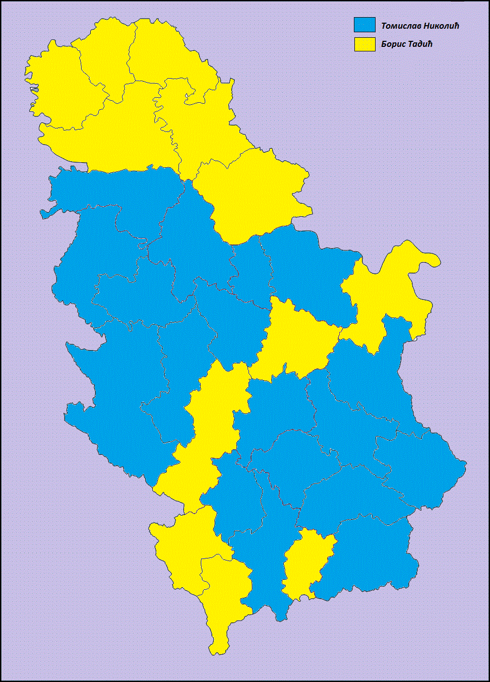 izbori 2012